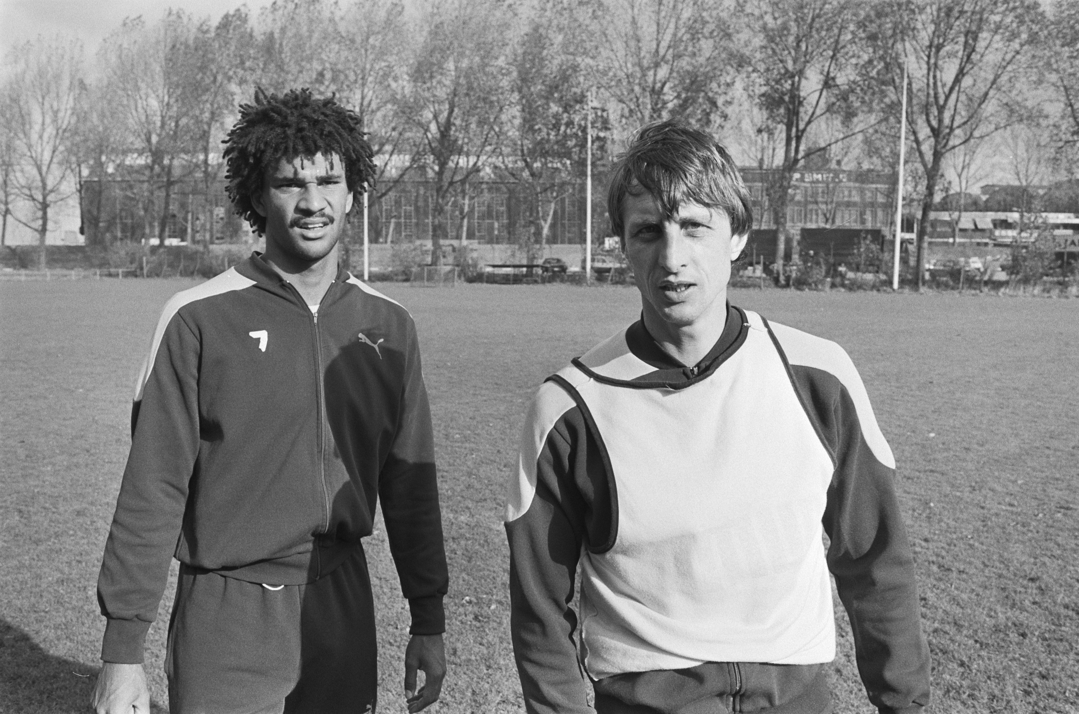 Training Feyenoord; Ruud Gullit (l) en Johan Cruijff Datum 31 oktober 1983